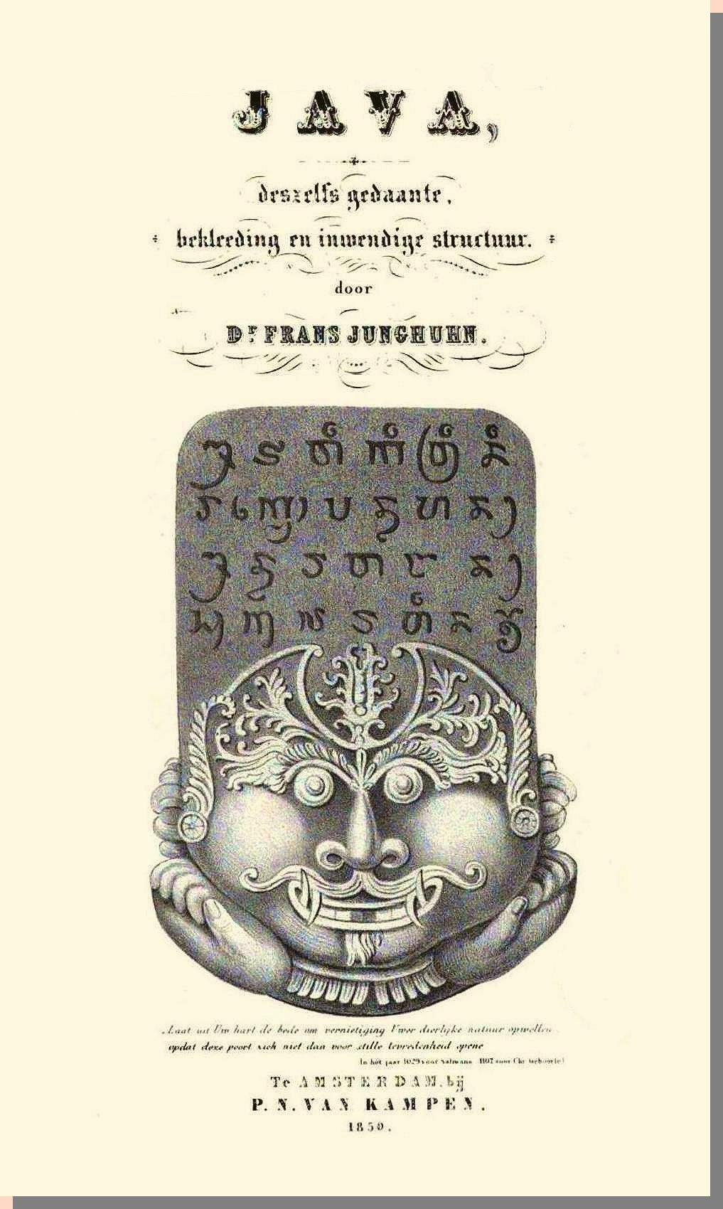 Titel der niederländischen Erstausgabe des Werks „Java“ von Franz Junghuhn